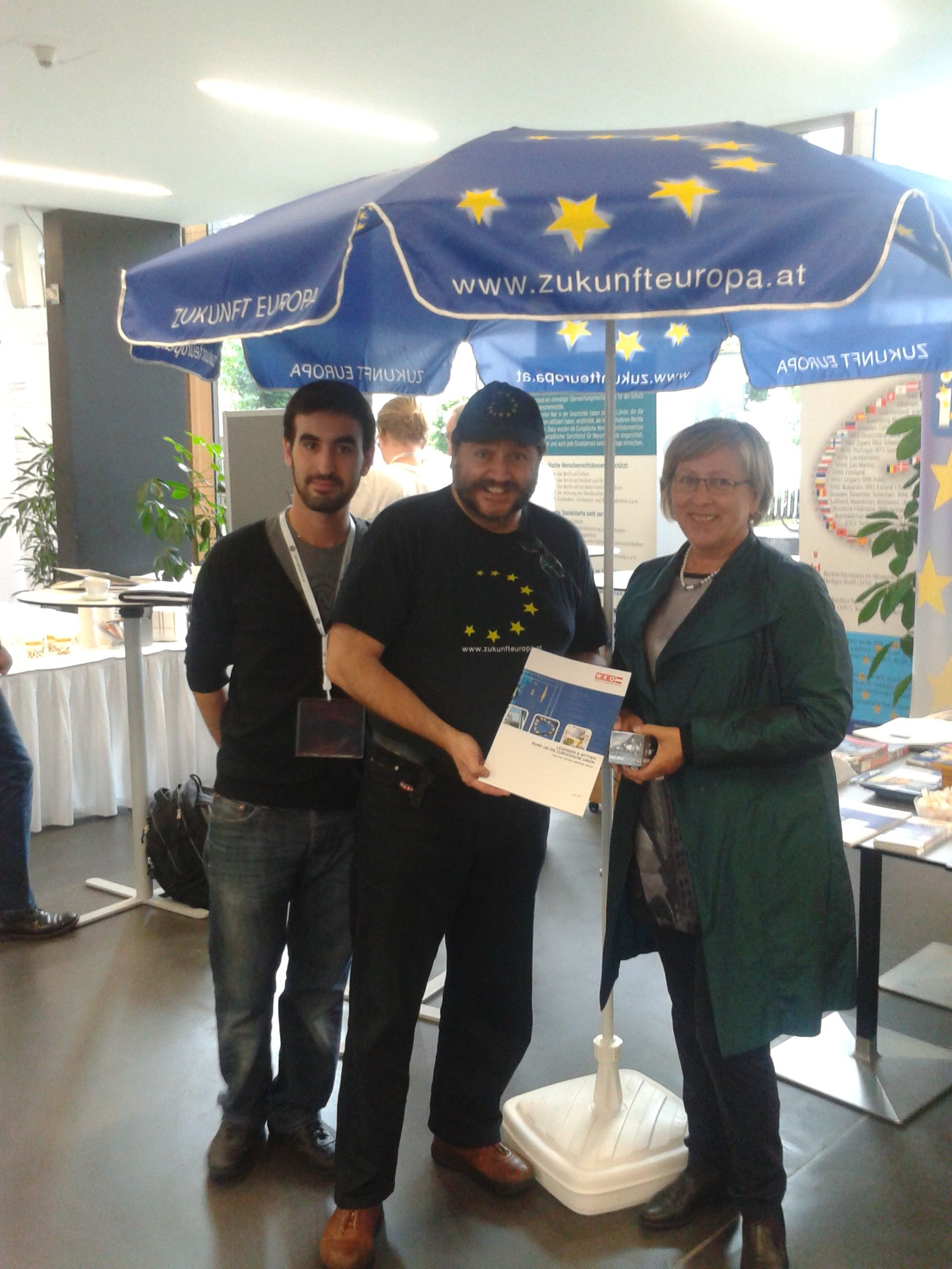 Mitarbeiter der Europaunion Vorarlberg und der Jungen Europäischen Föderalisten, Abdul Aydemir, Repräsentant der Wirtschaftskammer Österreich, Karl-Heinz Wanker mit Frau Dr. Lichtenberger unter dem Europaschirm beim Informationsstand der EuropaUnion Vorarlberg anlässlich der WikiCon 2012 in Dornbirn (31. August bis 2. September 2012).